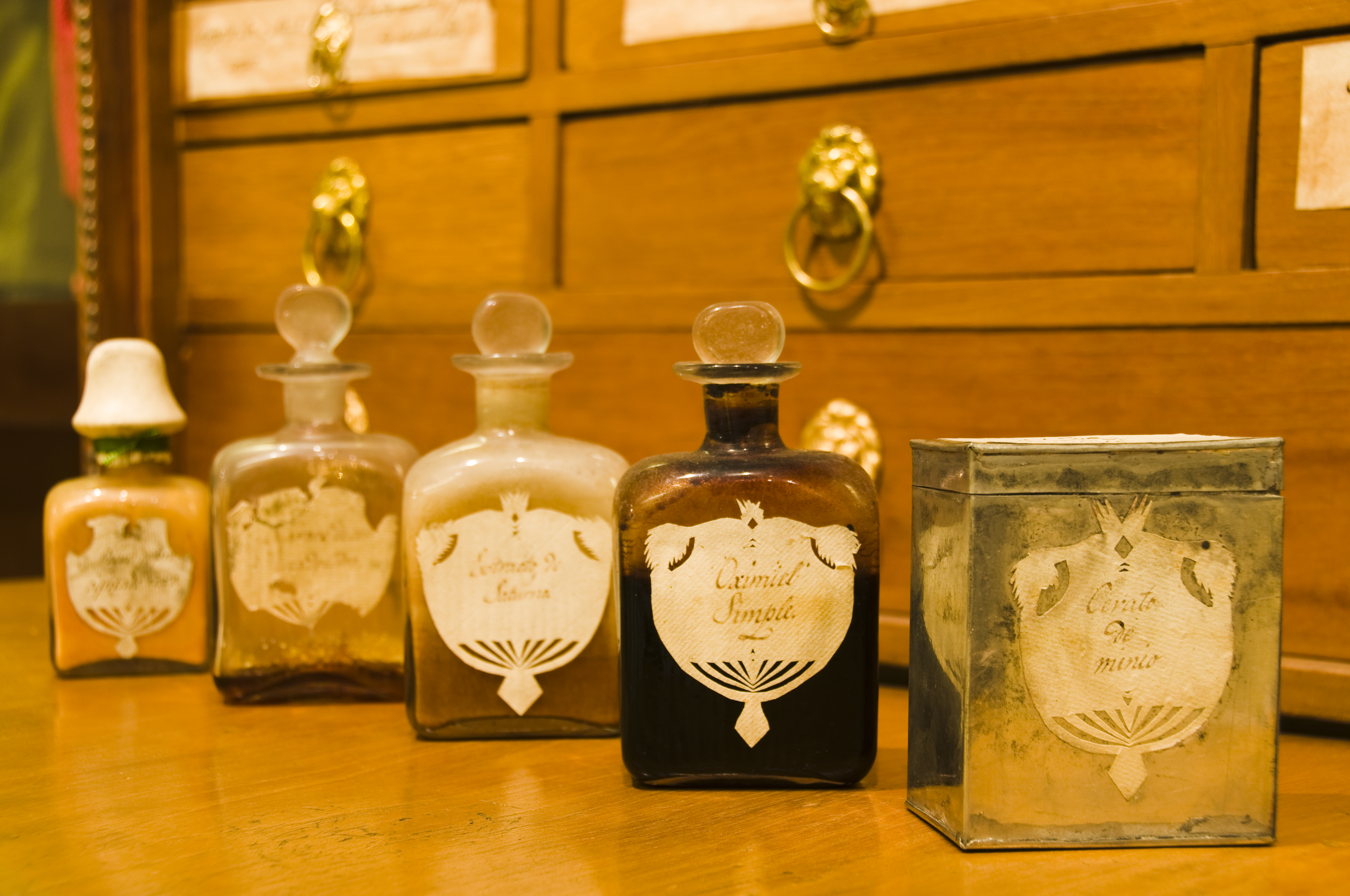 Contenido del Botiquín deManila